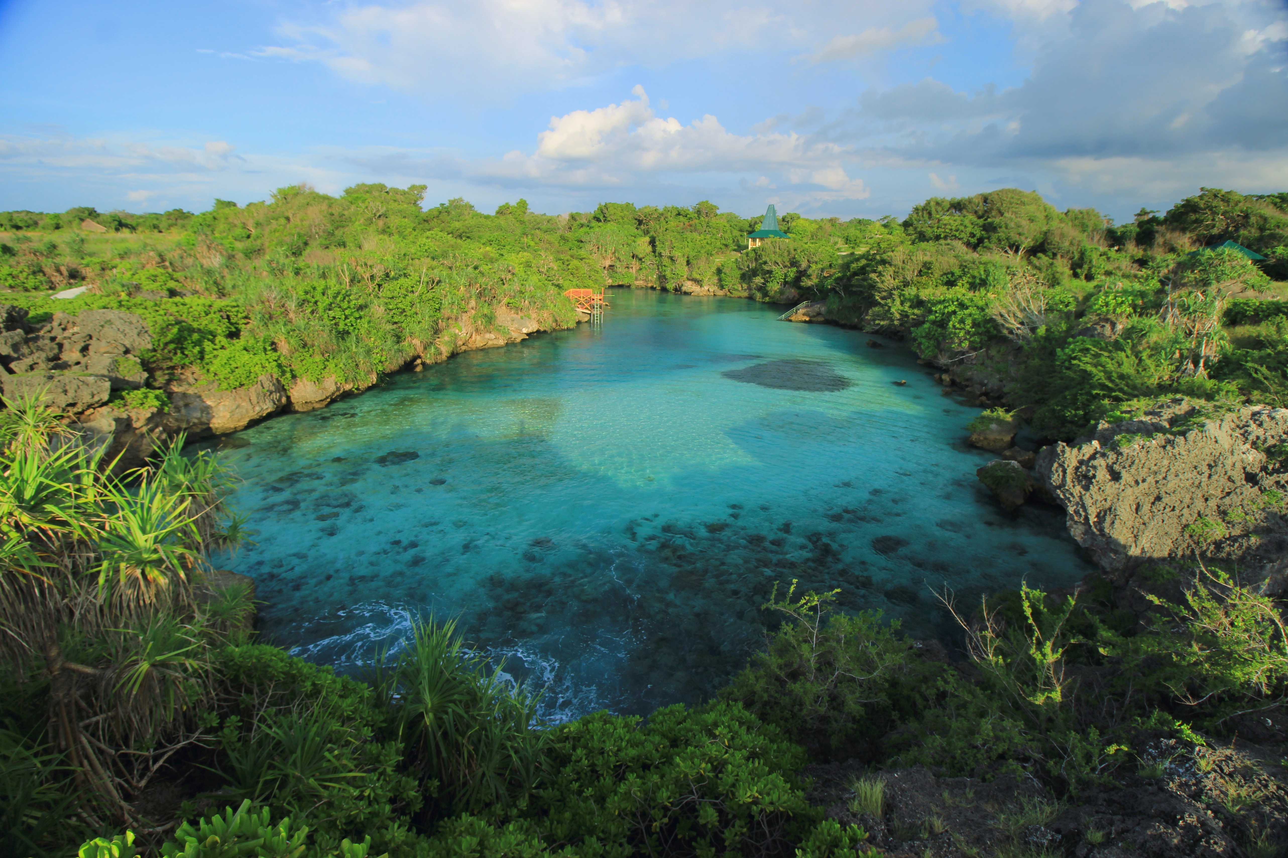 Danau Weekuri adalah sebuah laguna air asin yang berdampingan langsung dengan laut lepas. Terletak di Kec. Kodi, Sumba Barat Daya, Nusa Tenggara Timur, Indonesia.